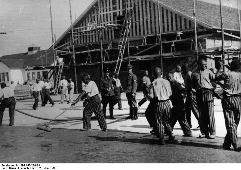 Dachau, Konzentrationslager Schutzhaftlager Dachau.- Häftlinge unter Aufsicht bei der Arbeit.